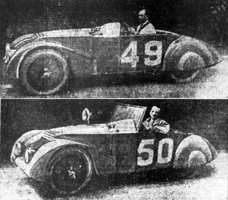 Robert Sénéchal-Albéric Loqueheux (49) et Raymond Glaszmann-Manso de Zuniga (50),vainqueurs des coupes bi- (50) et tri- (49) ennales pour Chenard et Walker, avec des moteurs de 1.1L (24 heures du Mans 1925)